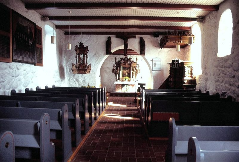 Grossenwiehe Kirke i Danmark. Skibet set mod øst